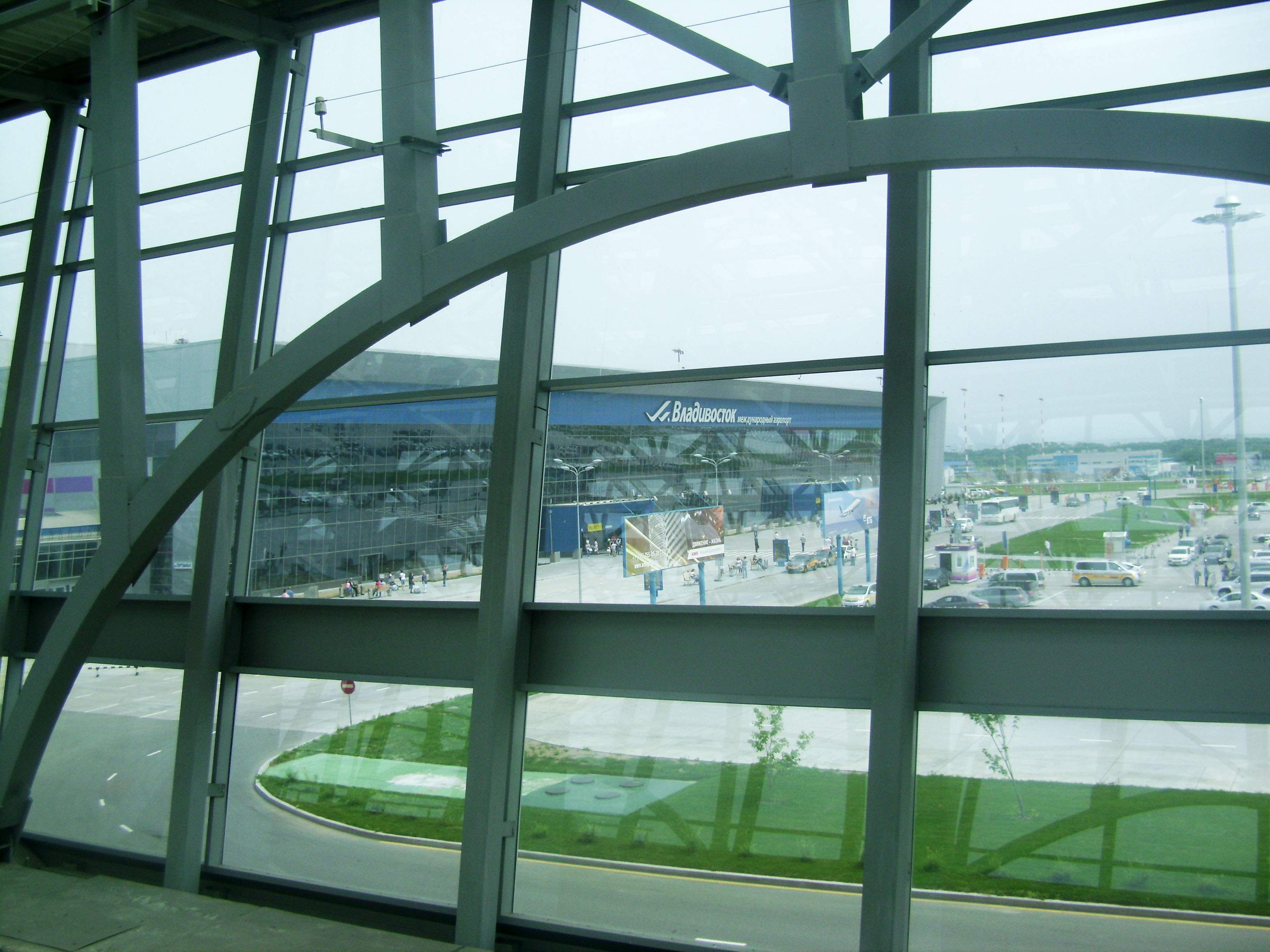 Аэропорт Кневичи (Владивосток) с перрона аэроэкспресса, 2013-07-09